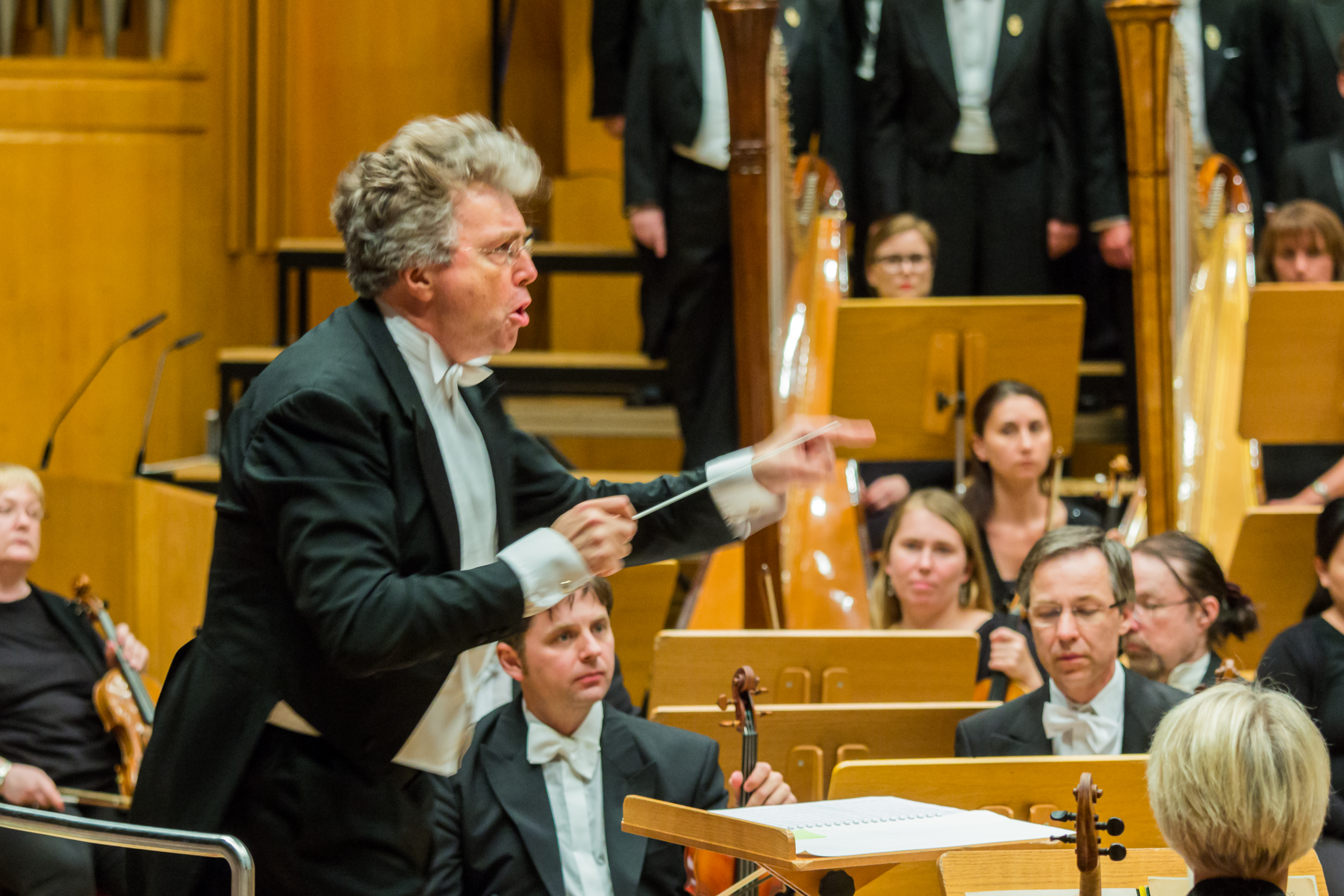 Festakt zum 175. Jubiläum des Zentral-Dombau-Vereins und des Kölner Männer-Gesang-Vereins Foto: Bernhard Steiner dirigiert den Kölner Männer-Gesang-Verein, begleitet von der Neuen Philharmonie Westfalen, 2017